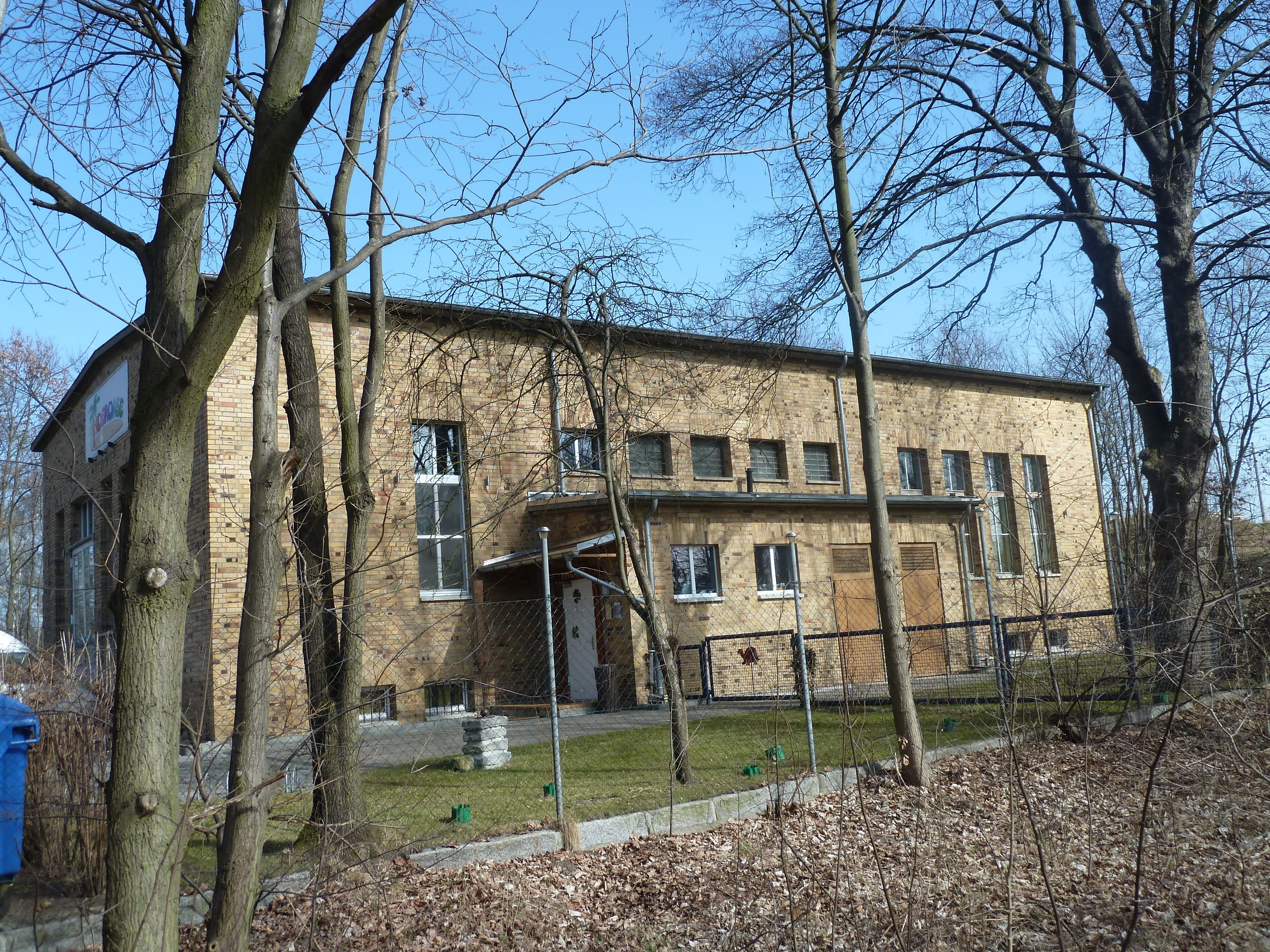 Das ehemalige Umspannwerk am Bahnhof Teltow für die von 1951 bis 1961 dort fahrende S-Bahn steht unter Denkmalschutz